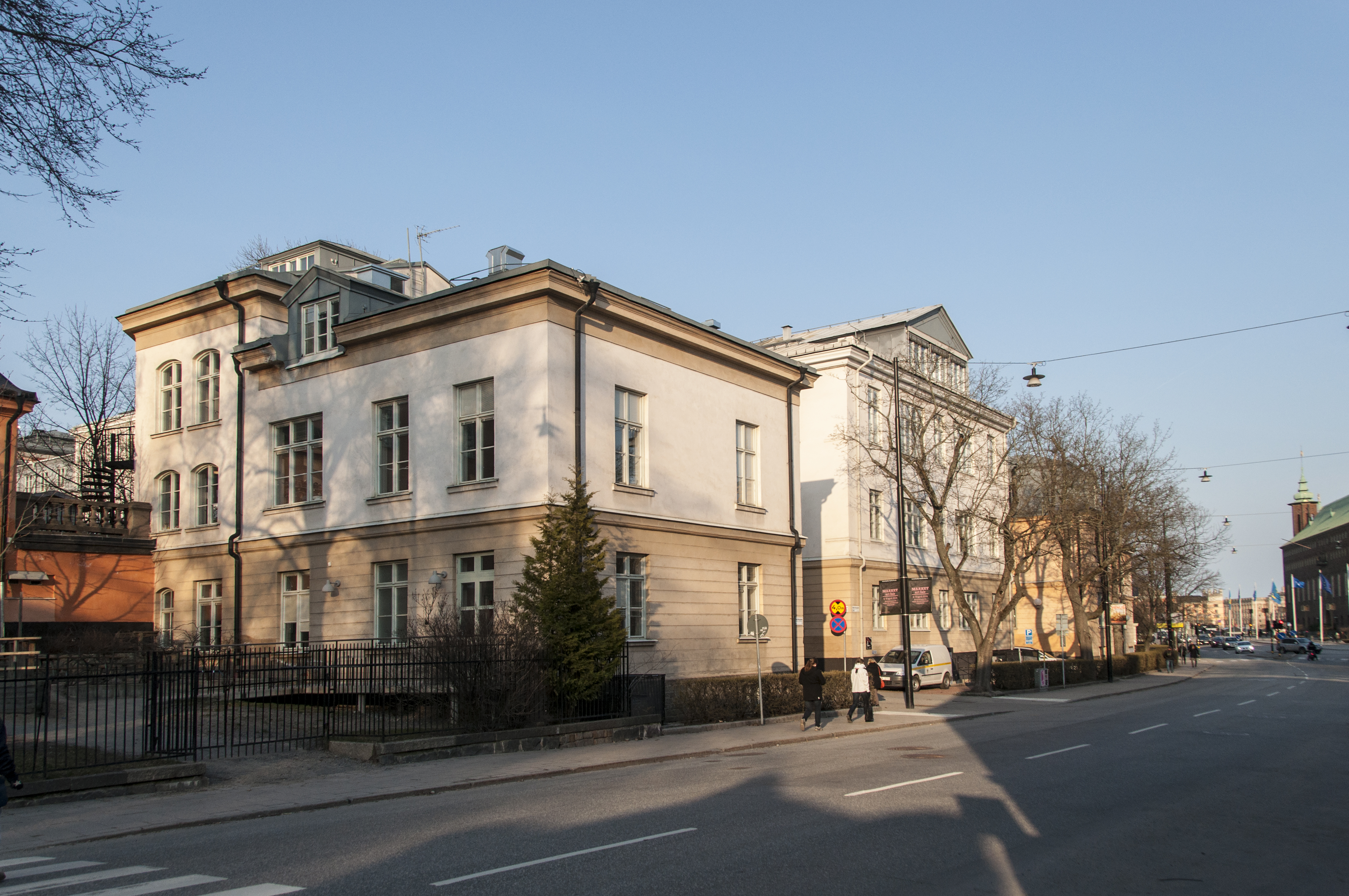 Gamla Operationsbyggnaden, Serafimerlasarettet. Nybyggnadsår 1889 - 1893, Axel Kumlien (Arkitekt) Kungliga Serafimerlasarettet (Byggherre)